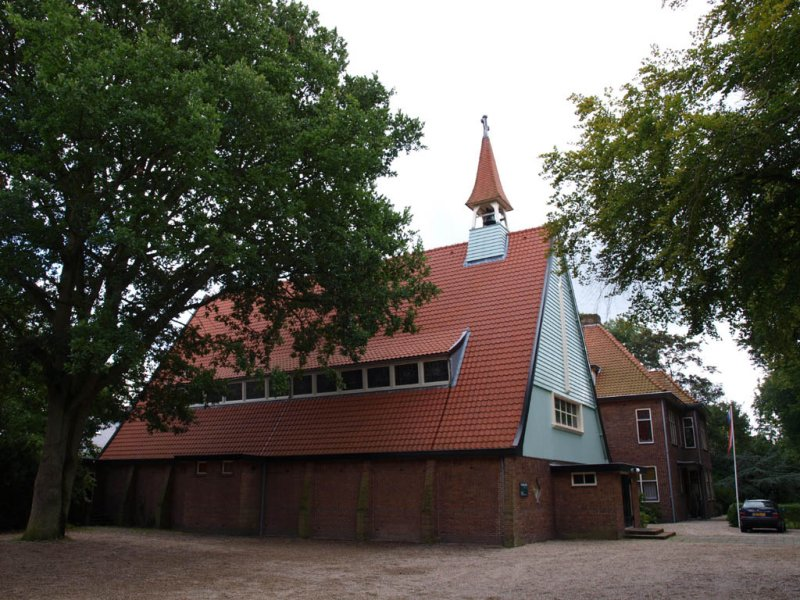 RK antoniuskerk in Aerdenhout, ontworpen als noodkerk door Jos Cuypers en Pierre Cuypers jr. in 1922.